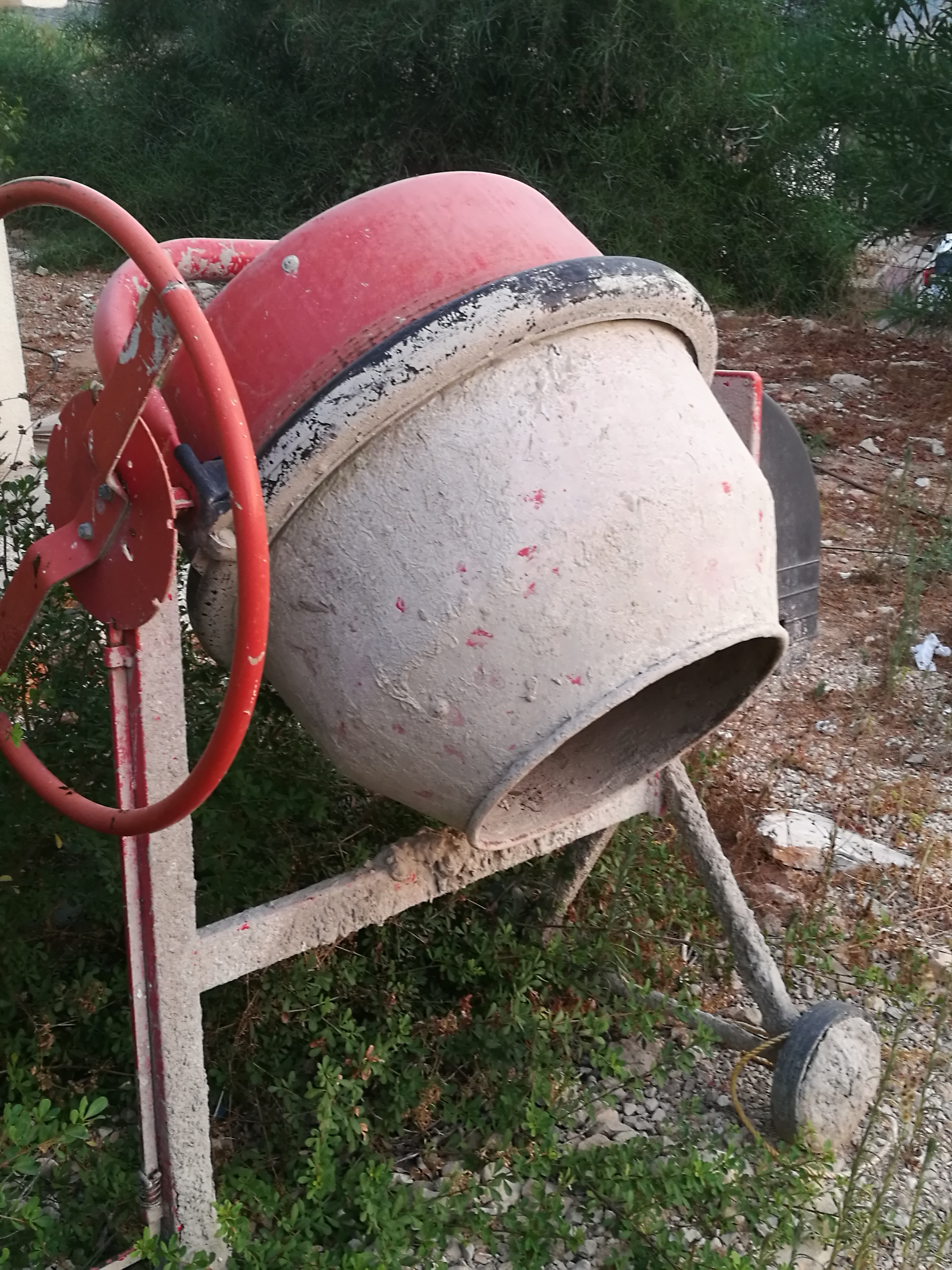 מערבל בטון